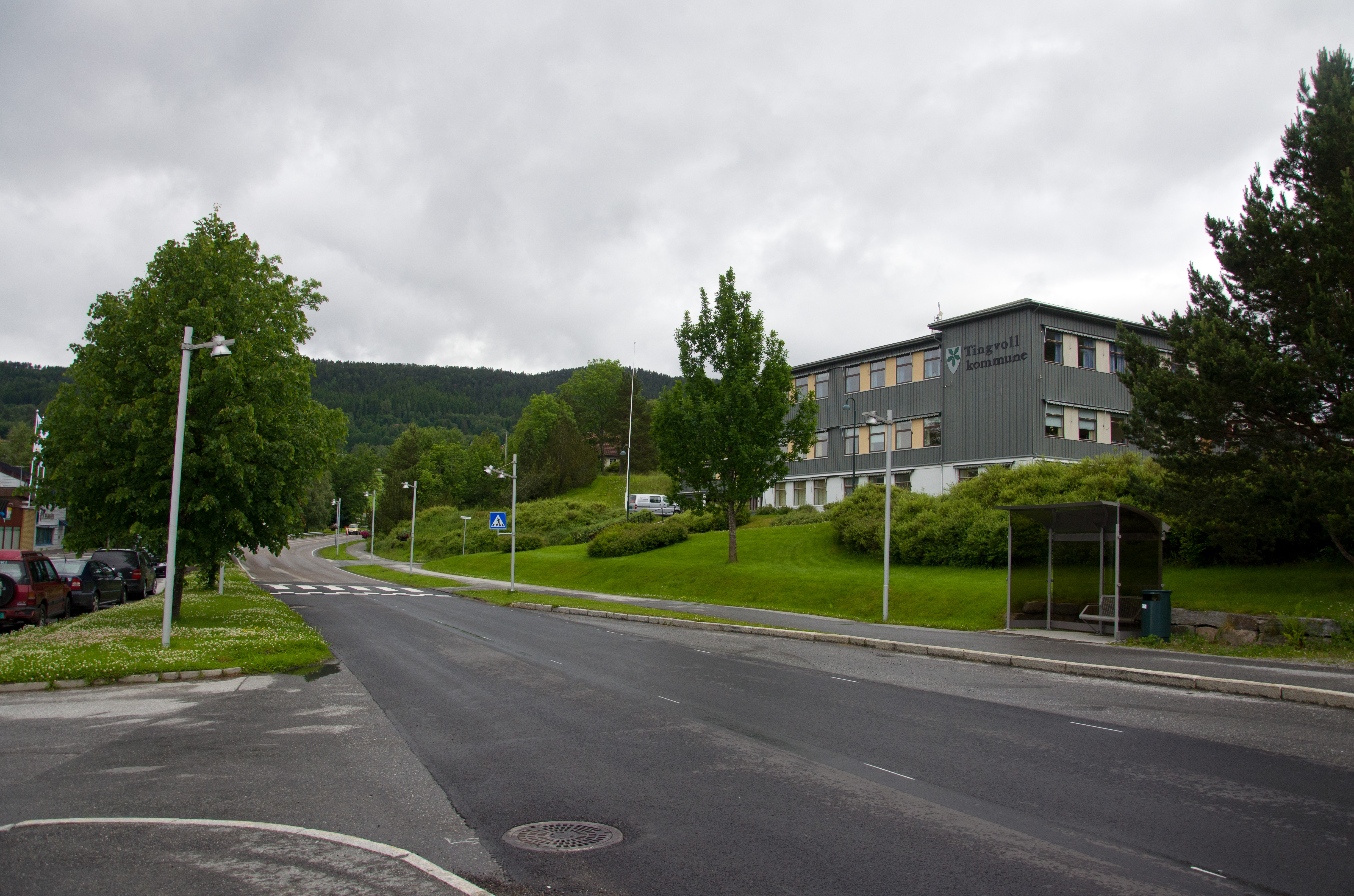 Tingvollvågen. Kommunehuset og Vågavegen (riksvei 70).